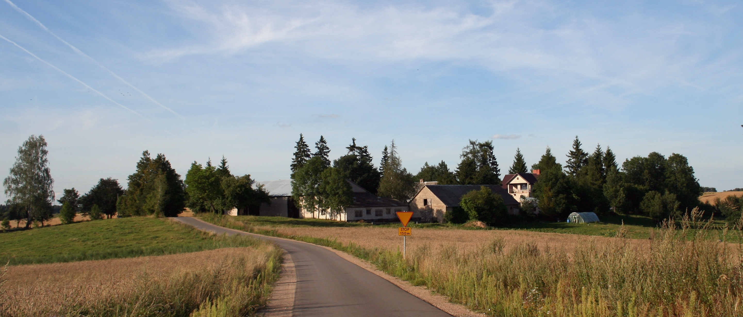 Skustele, gmina Krasnopol, woj. podlaskie